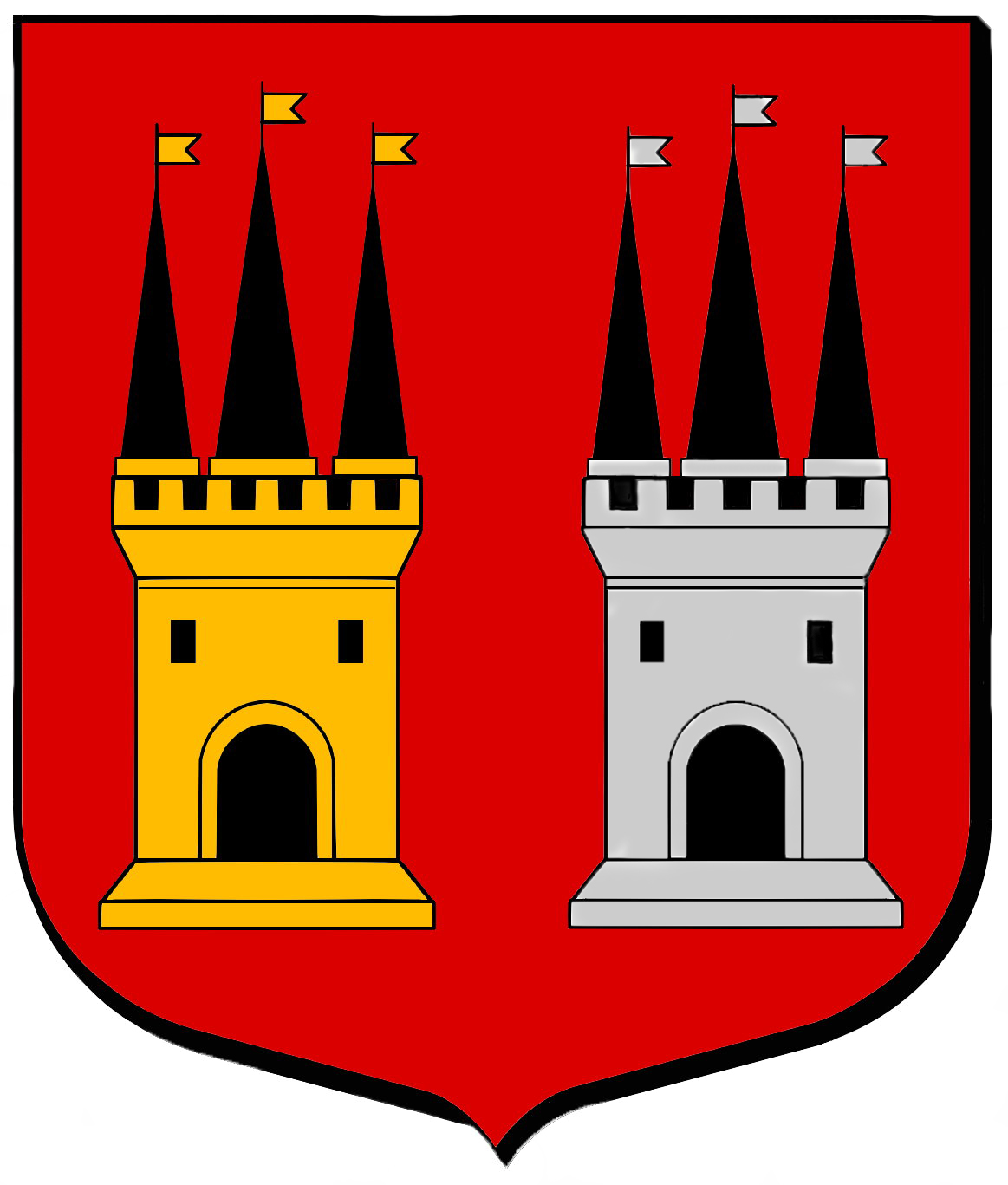 De gueules à deux tours ouvertes et ajourées de sable, les créneaux de même, essorées chacune de trois pièces pointues aussi de sable et girouettées, celle du milieu plus haute ; la tour de dextre d'or crénelée de sept pièces et girouettée du même, celle de senestre d'argent crénelée de six pièces et girouettée du même